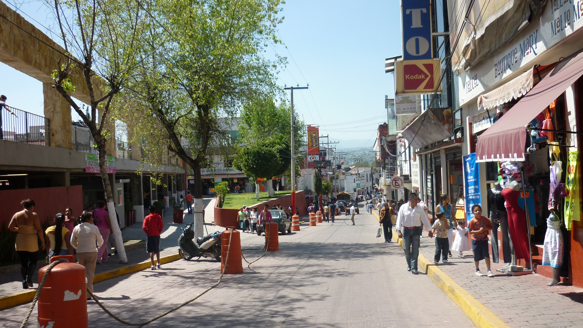 Ciudad Nicolás Romero (San Pedro), cabecera municipal de Nicolás Romero, Estado de México.